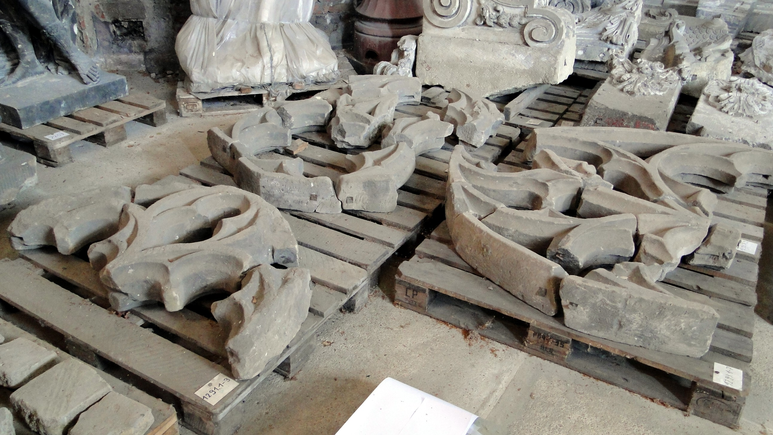 Gotisches Maßwerk der mittelalterlichen Dresdner Sophienkirche, beim Umbau der Kirche 1864/68 entfernt und als Bodenverfüllung genutzt, beim Abbruch der Kirche geborgen und im Lapidarium Zionskirche eingelagert